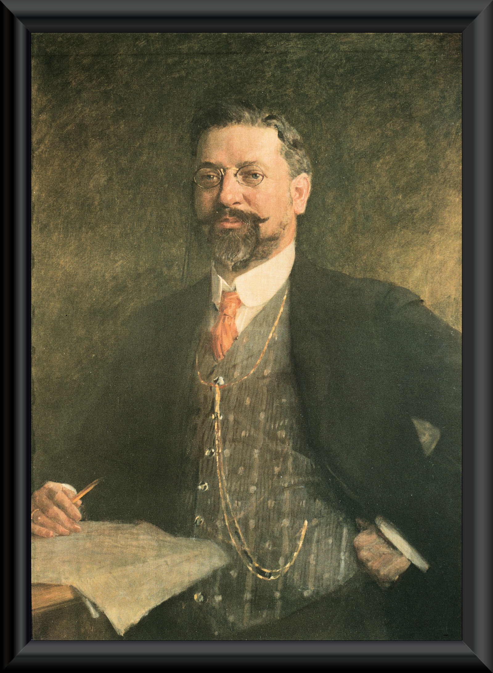 Das Ölgemälde von 1905 stammt aus dem Nachlass von Bruno Möhring, Berlin-Marienfelde. Auf dem Gemälde ist Bruno Möhring 42 Jahre alt.